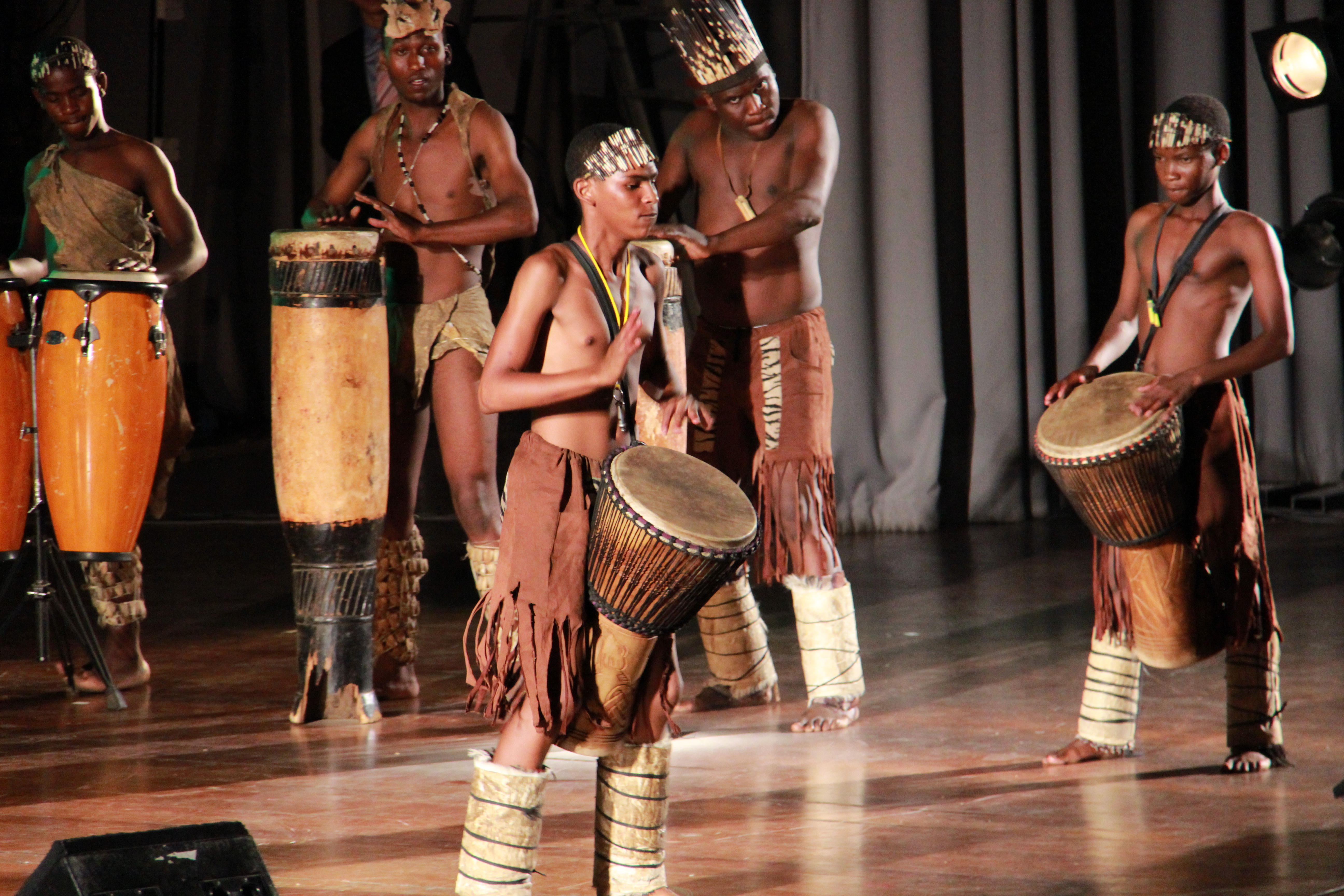 非洲的鼓铿锵有力，让人震撼 This is an image of "African people at work" from Botswana